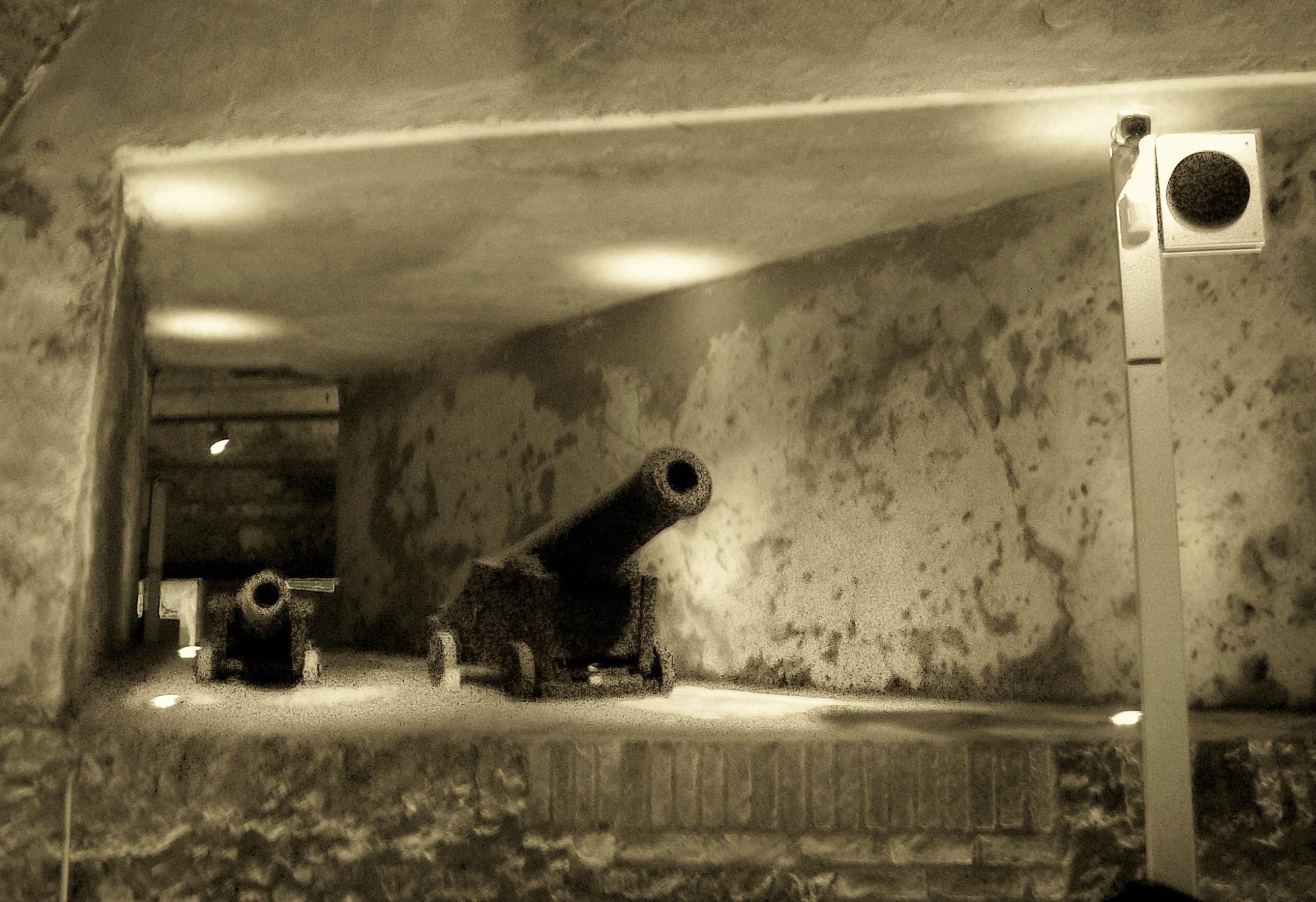 Tronera del Fuerte de Buenos Aires, en el Museo del Bicentenario.